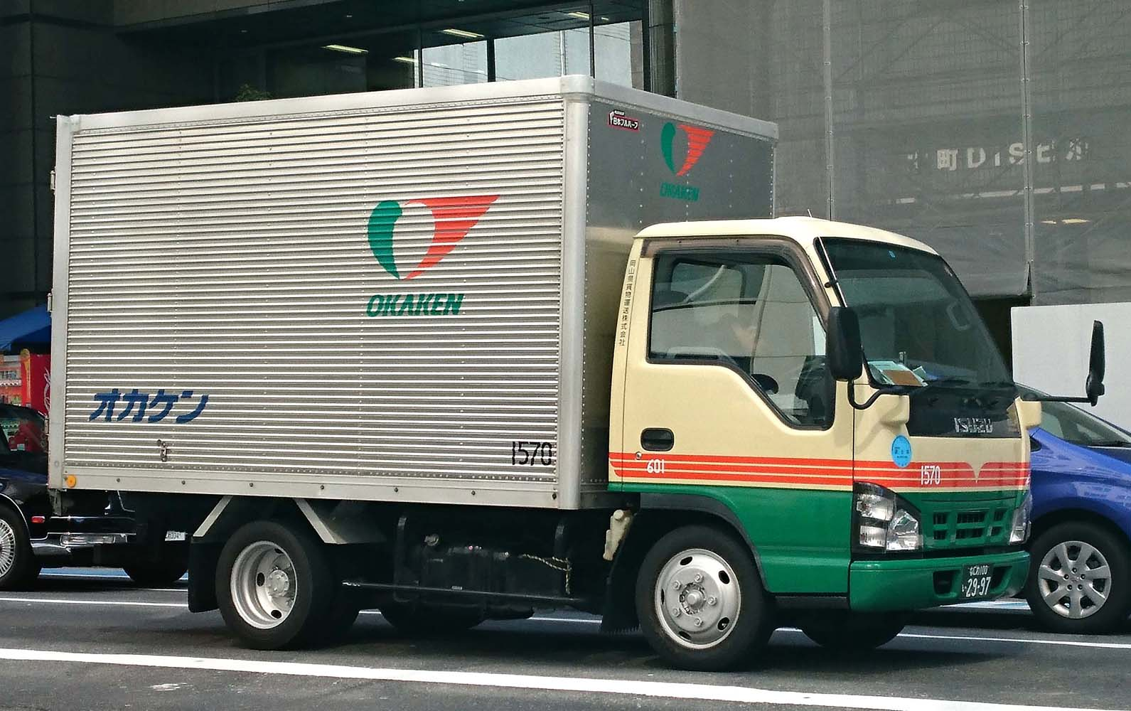 岡山県貨物運送株式会社のトラック画像。